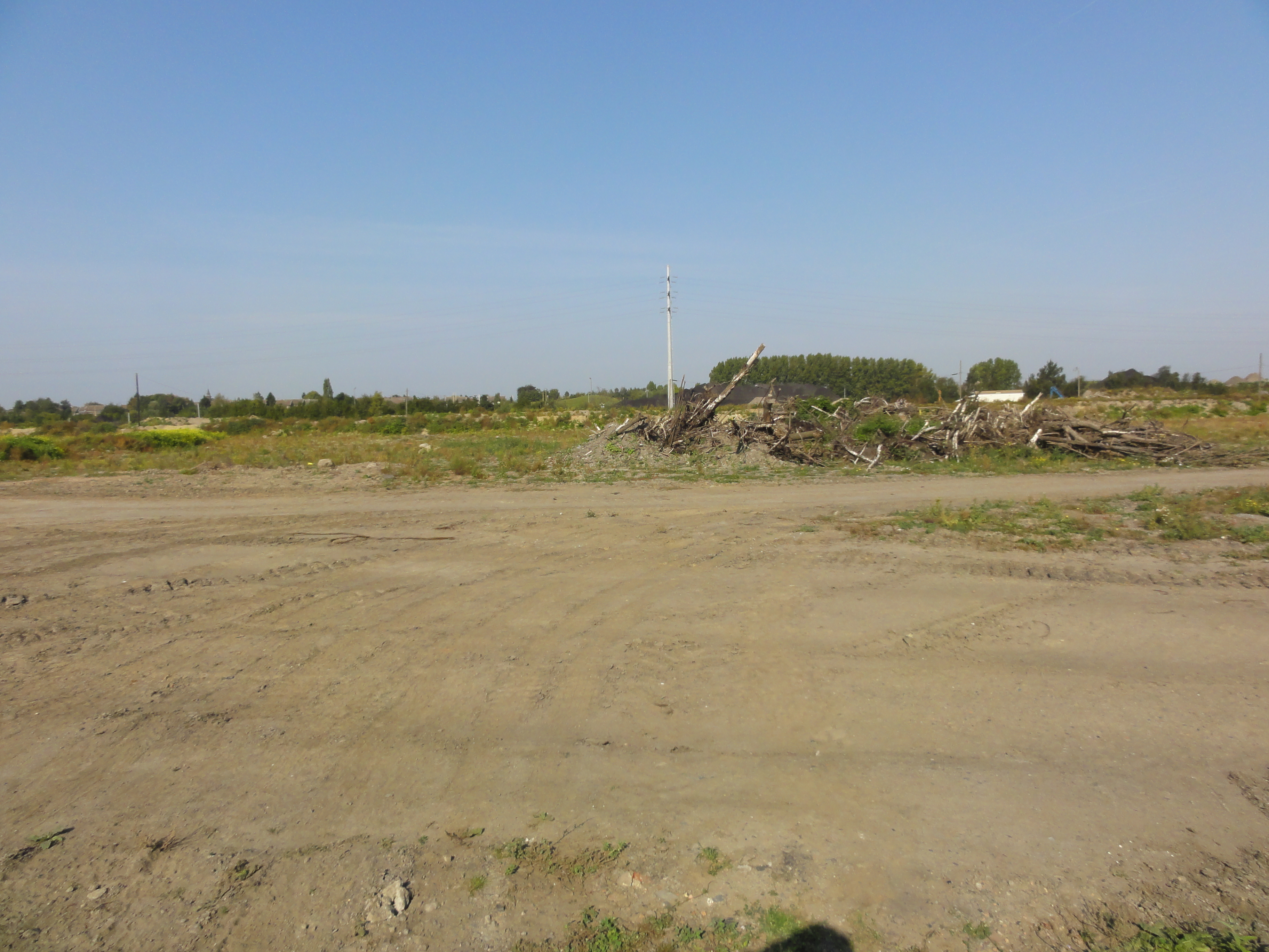 Terril n° 179A dit Mixtes sur 179, Fosse Thiers de la Compagnie des mines d'Anzin, Onnaing, Nord, Nord-Pas-de-Calais, France.